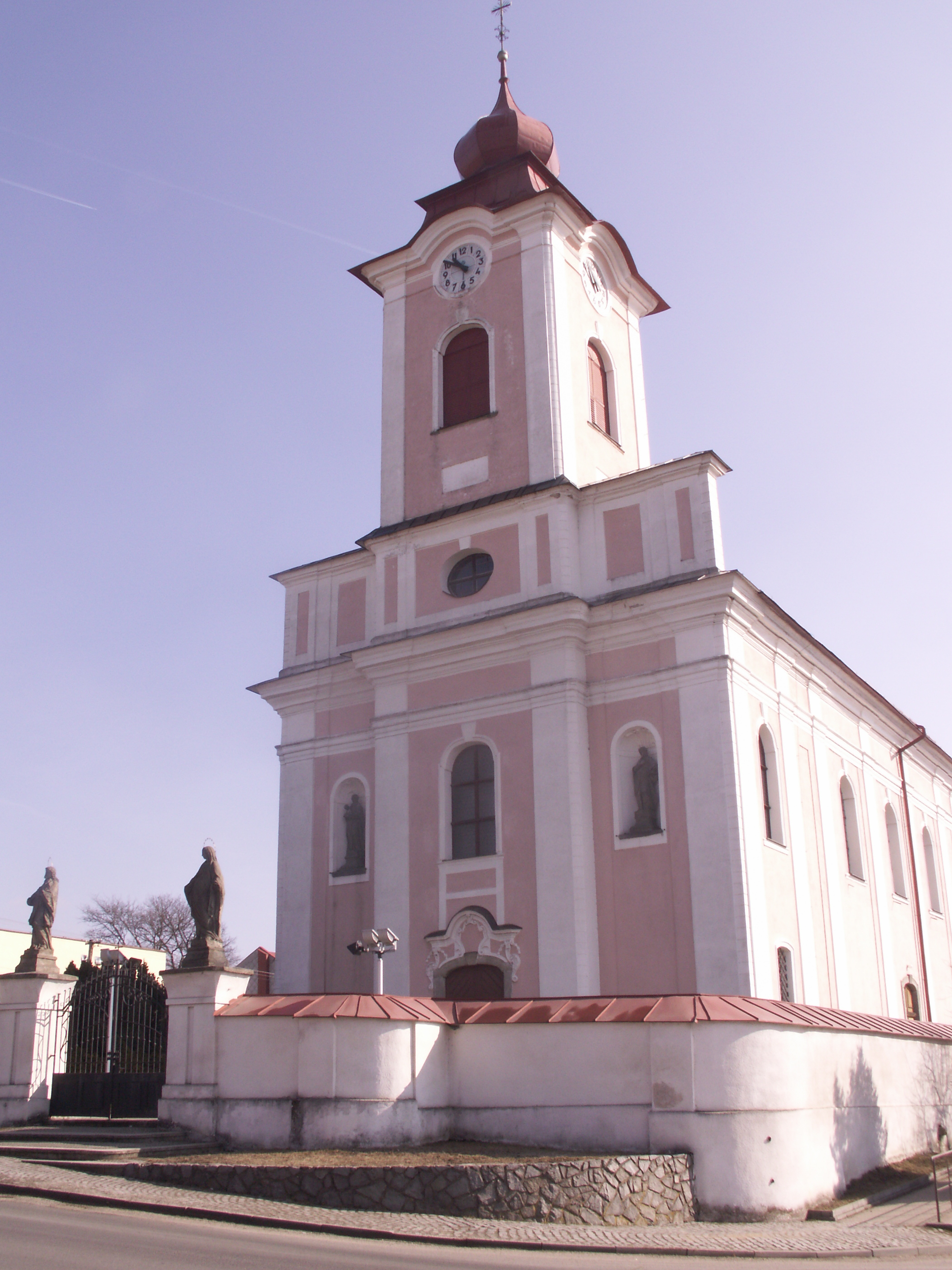 kostel sv. Václava v Novém Veselí, okres Žďár nad Sázavou, kraj Vysočina